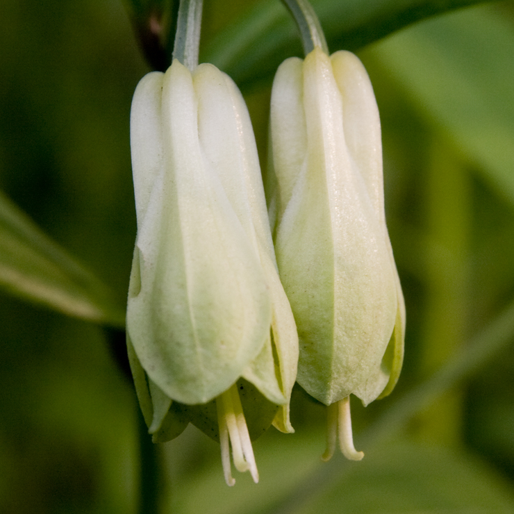 ホウチャクソウ (学名:Disporum sessile)